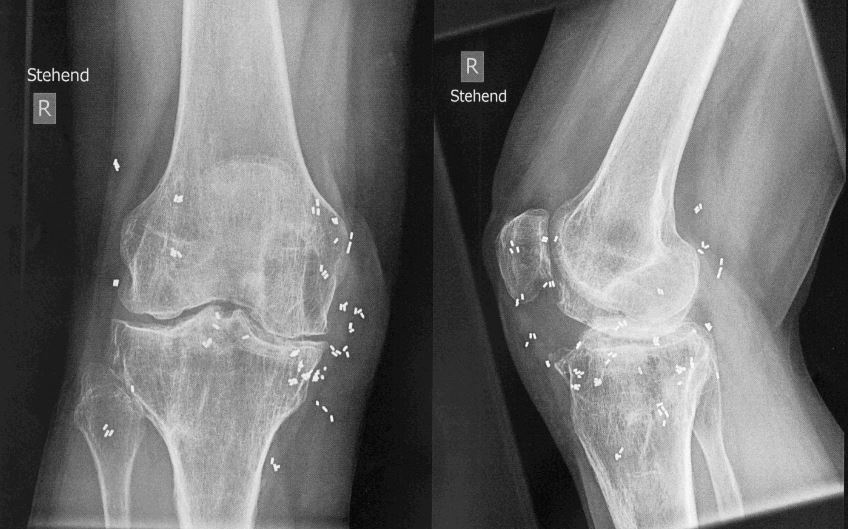 Gonarthrose mit Goldimplantaten